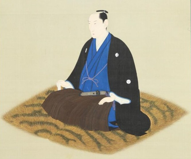 真田幸良の肖像。